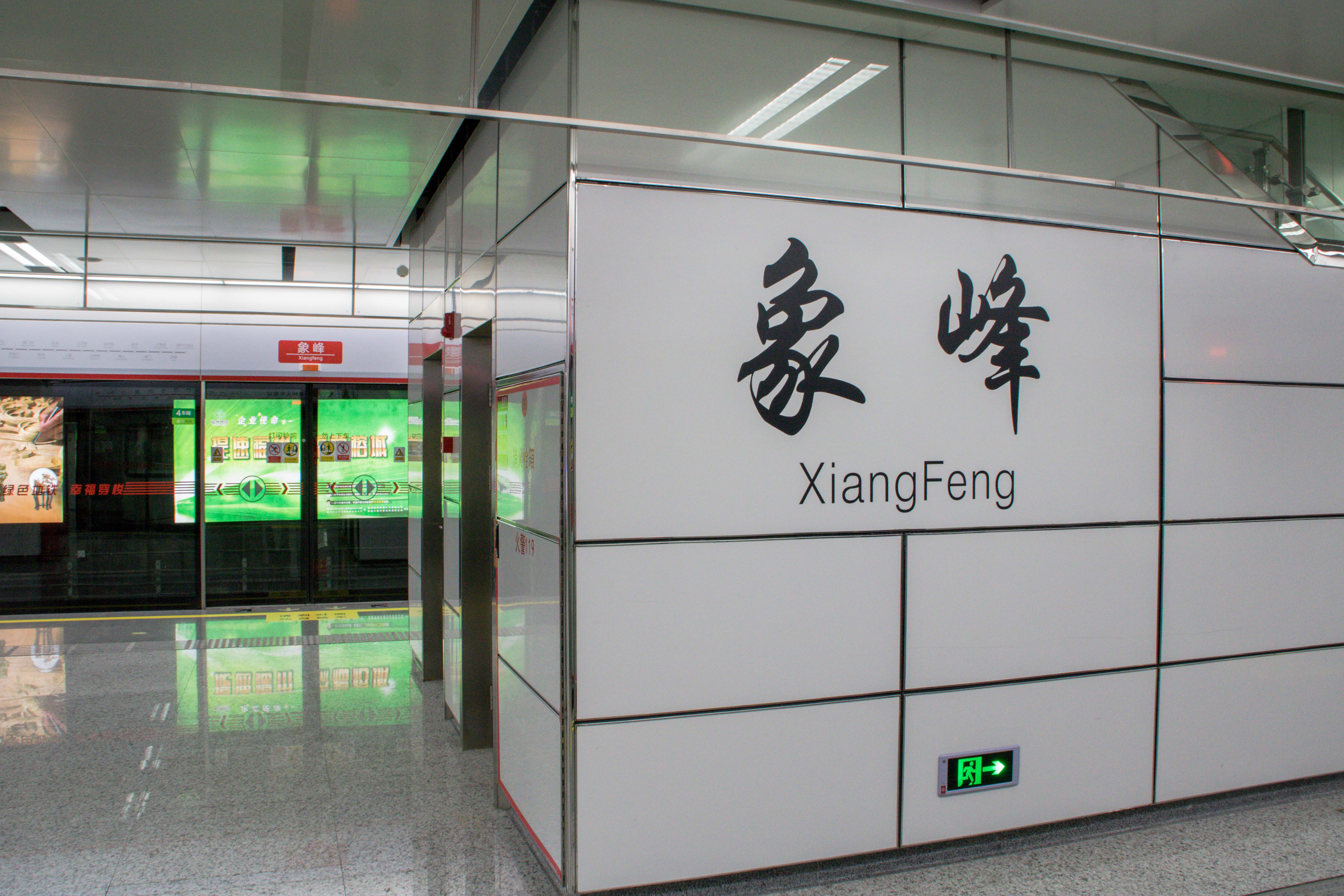 象峰站大字壁